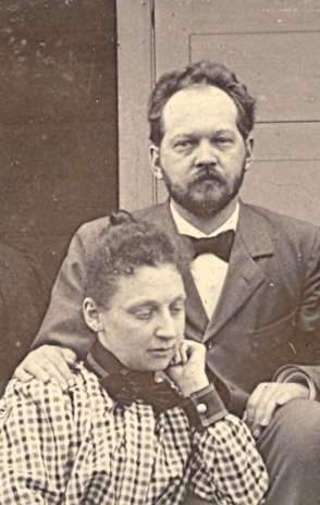 Max och Anna Oker-Blom